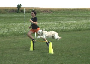 Turnierhundsport